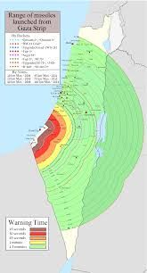 Range of misssiles Israel.